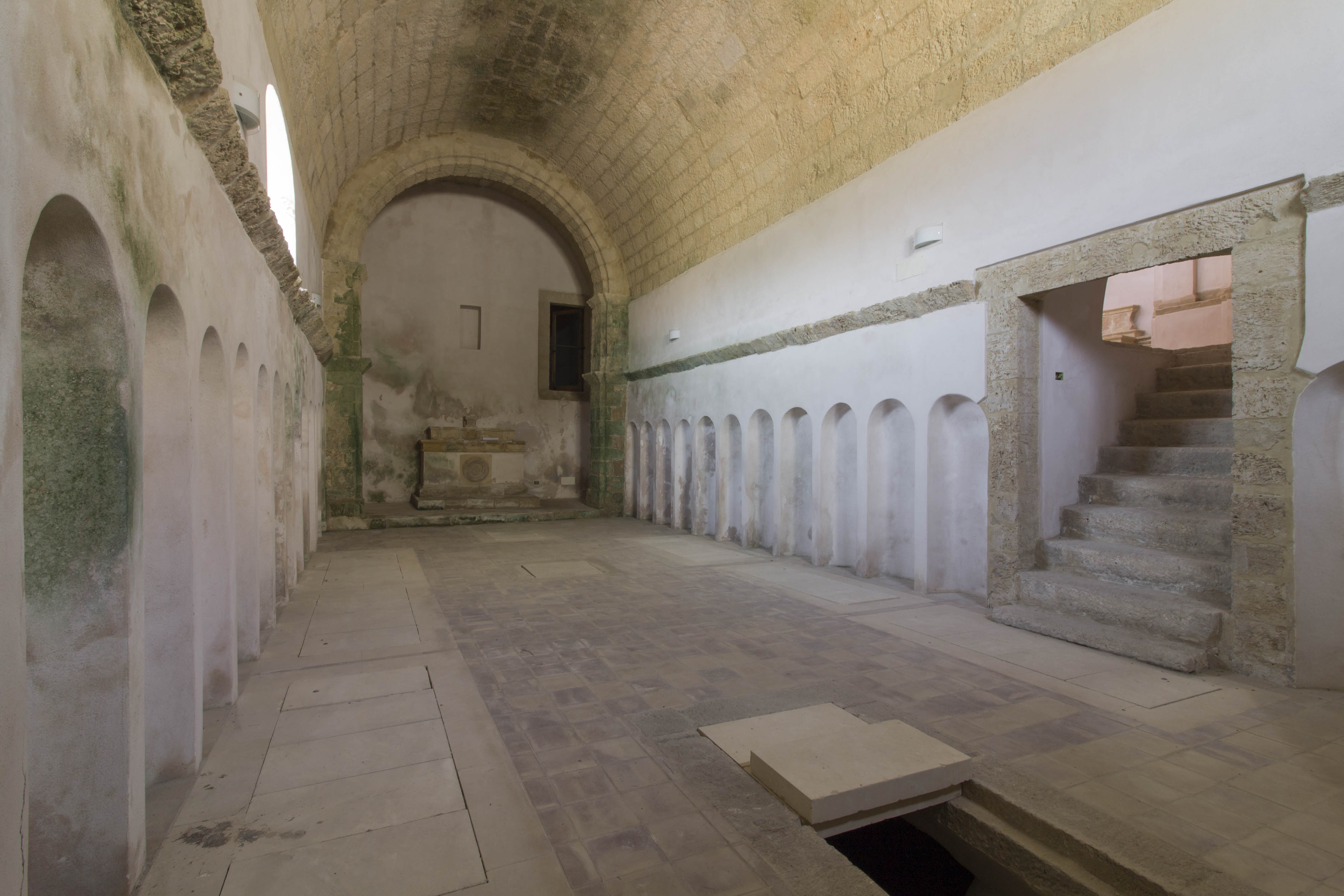 Il convento è ubicato nella parte storico-monumentale del cimitero comunale di Lentini; per molto tempo è stato lasciato nel più totale abbandono e degrado, tanto che la volta della chiesa e diverse volte di alcune corridoi sono crollate, ai giorni nostri però il convento si presenta in una veste nuova, totalmente messo in sicurezza e restaurato ( attende altri restauri, soprattutto di affreschi salvatisi dalle interperie. Secondo alcune fonti, la fondazione del convento risalirebbero alla fine del '500, ma poi danneggiato dal terremoto del 1693, venne rifatto quasi a nuovo. Di notevoli dimensione, il convento ha una pianta quadrata, su due piani con porticato al centro e chiesa annessa; sopra i corridoi delle cellette è ancora possibile vedere i numeri e alcune citazioni scritte in latino. Sicuramente ciò che risalta di più di questo convento sono il porticato, la veduta dal campanile ( da cui ci si accede da una bellissima scala a spirale interamente in pietra, la zone delle cucine e delle sale da pranzo- dove è possibile vedere ancora ceramiche ed affreschi- e la chiesa, molto interessante dal punto di vista artistico e storico: ad essa sono annesse a destra una cappella laterale con altare in pietra affrescato ed a sinistra la cripta e l'ossario; il tetto è andato perduto ed è stato rifatto nuovo, tranne un arco in pietra che si è salvato e che ci fa capire come il tetto fosse formato da una volta a botte.